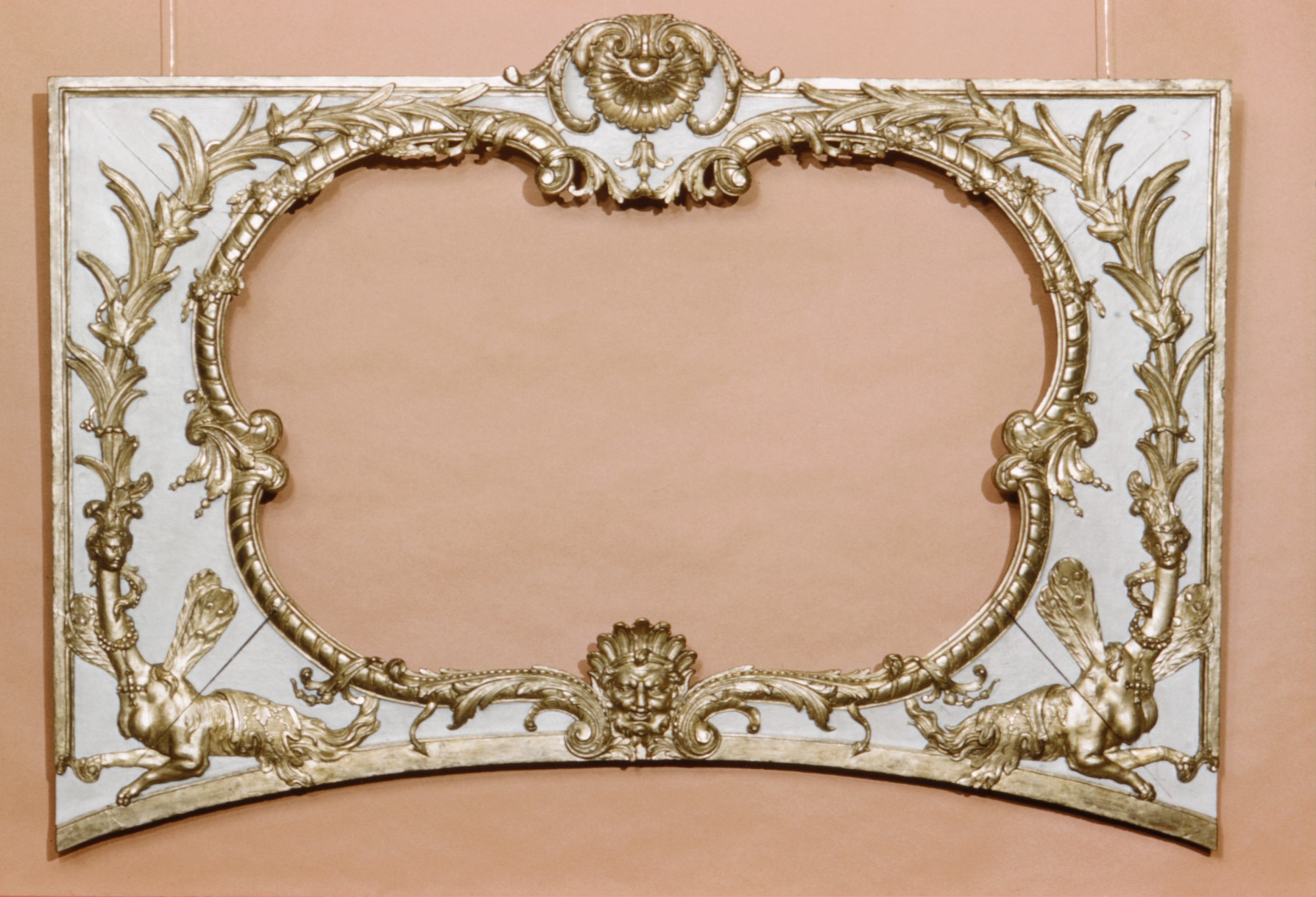 French; Overdoors; Woodwork